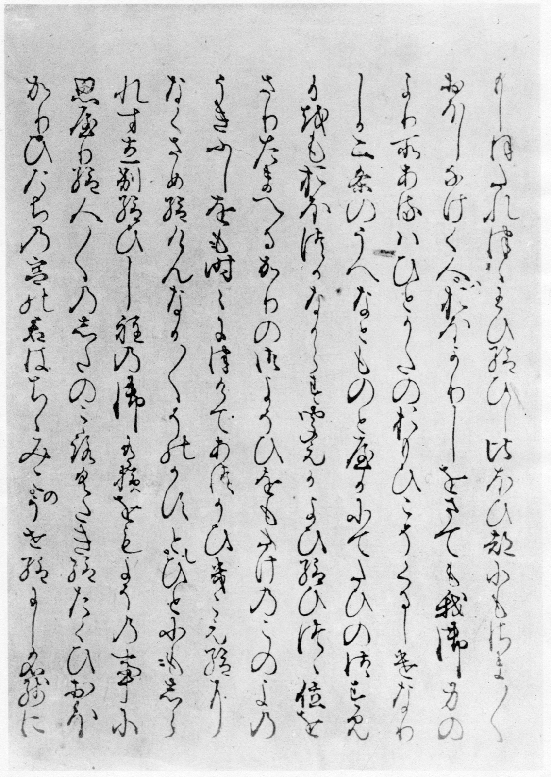 嵯峨本須磨巻。『定本源氏物語新解』中巻口絵より。